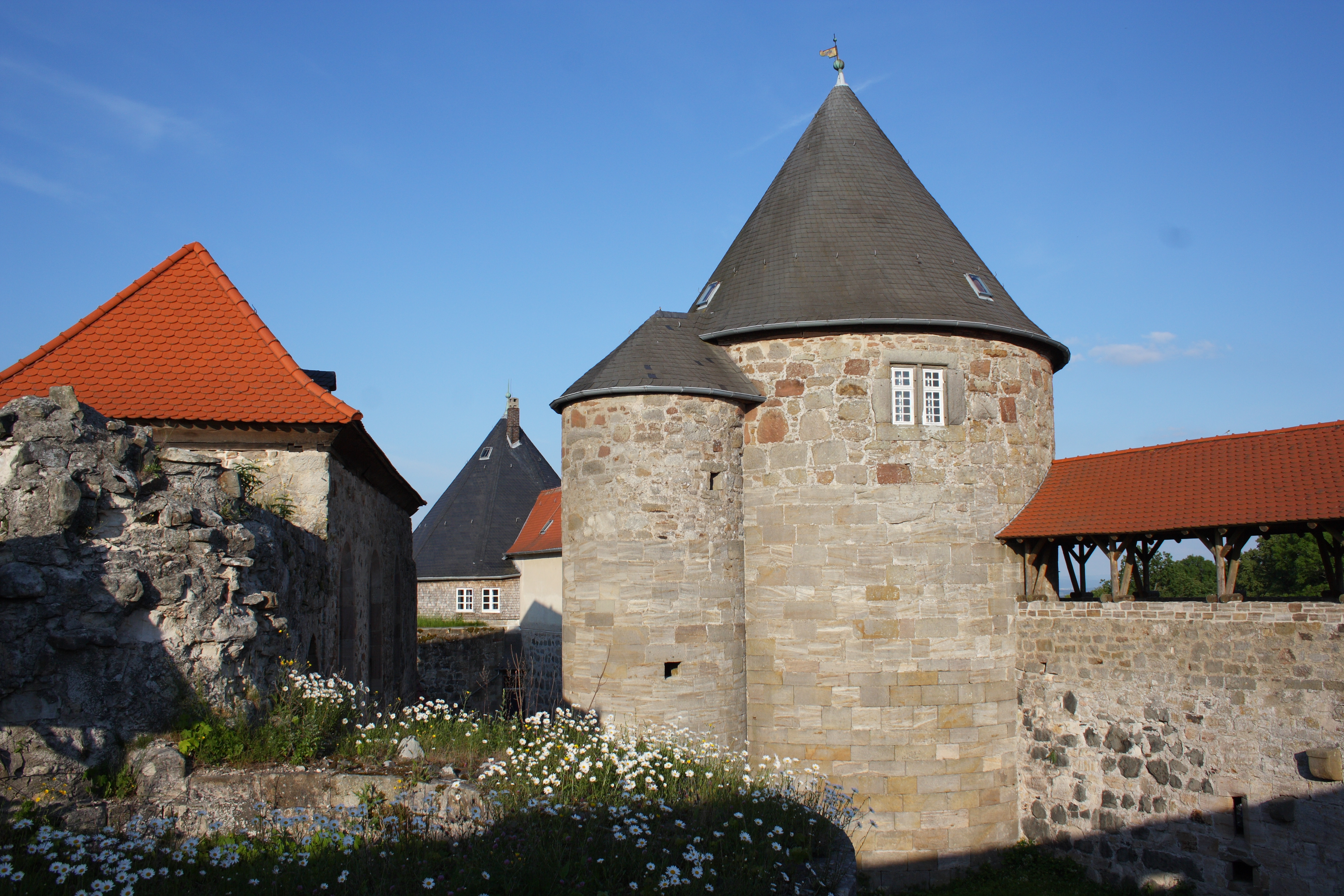 Burg Herzberg in der Gemeinde Breitenbach am Herzberg im Landkreis Hersfeld-Rotenburg (Hessen)